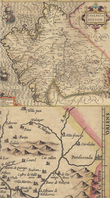 "Gallaecia Regnum". Mapa do Reino de Galicia elaborado no século XVII. E detalle do limite oriental deste na cidade de Ponferrada.